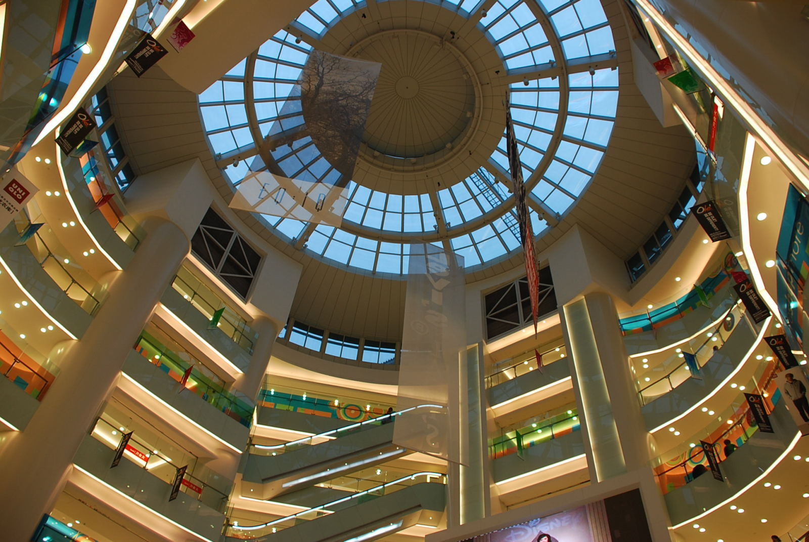 中文（中国大陆）: 新东安广场大厅